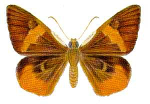 Chaetocneme critomedia sphinterifera